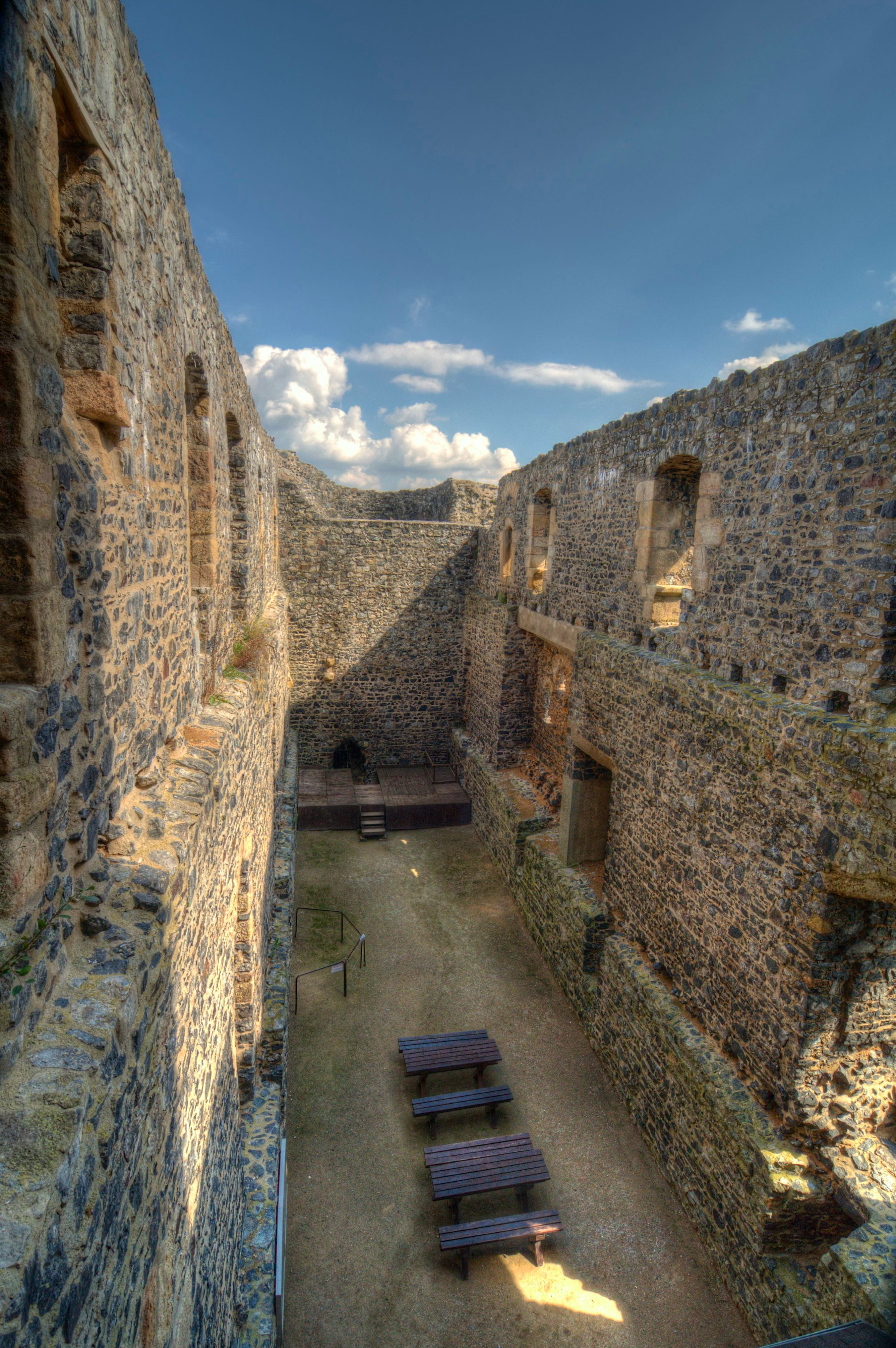 Interiér paláce k okrouhlé věži